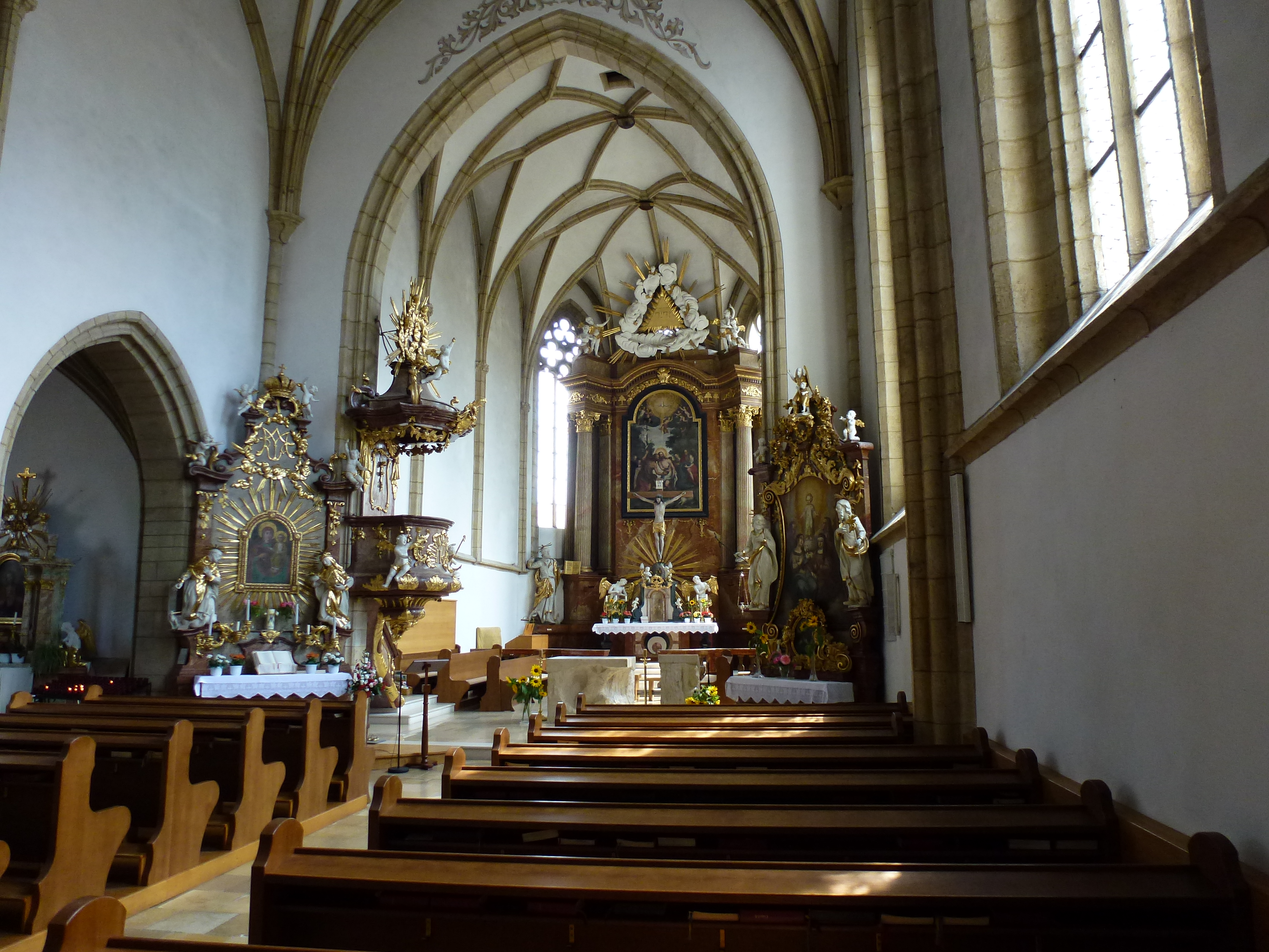 Kath. Pfarrkirche hl. Johannes der Täufer, Innenraum